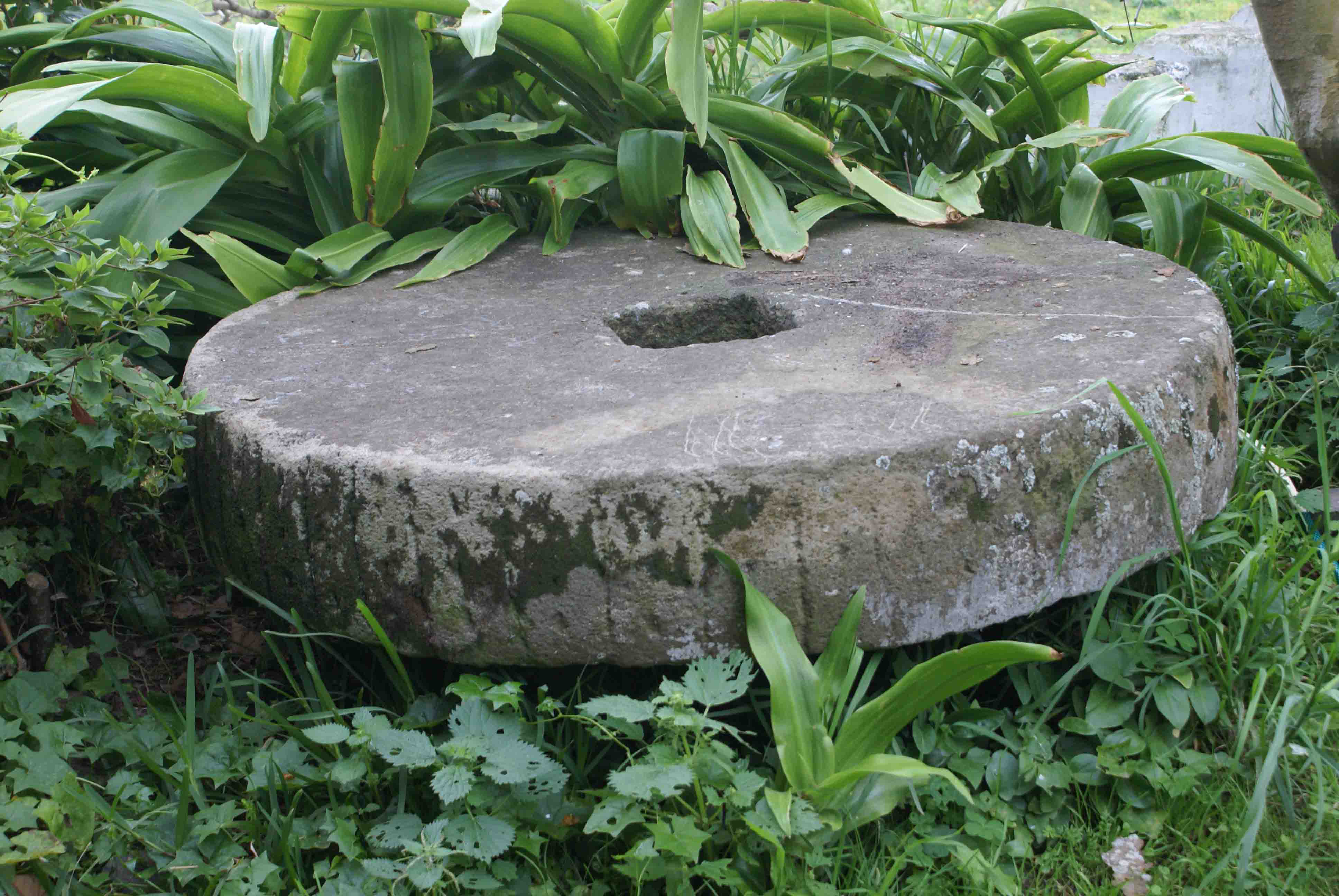 Pedra de triturar Urzela, Villa Maria, Angra do Heroísmo, ilha Terceira, Açores